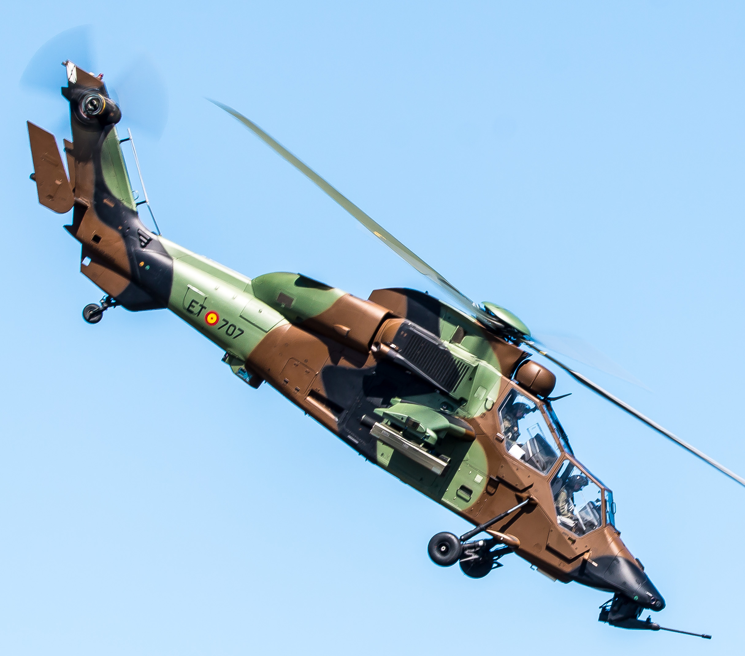 Eurocopter EC 655 Tigre. Festival Aéreo Internacional De Gijón. Gijón 2016.